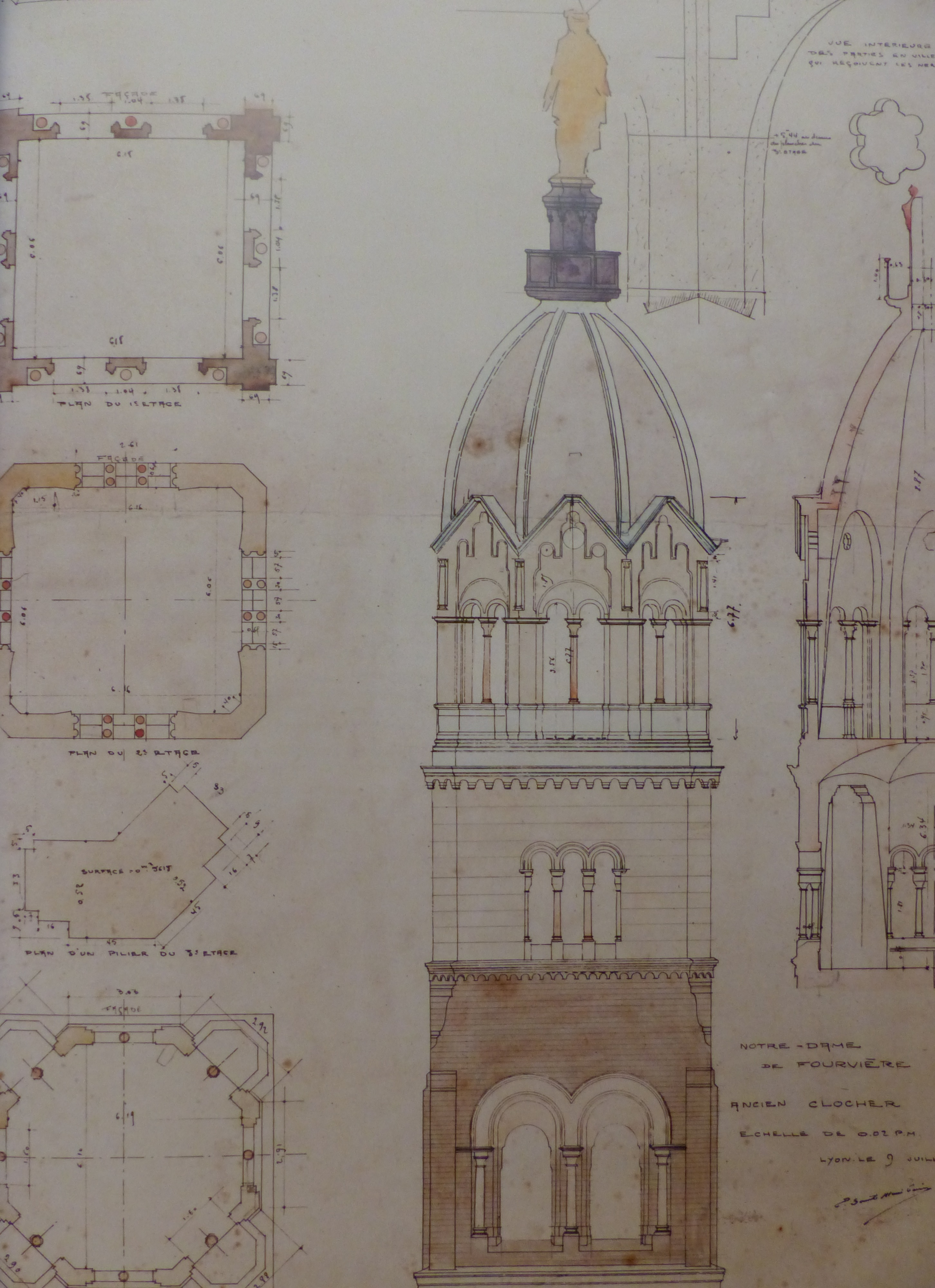 Plans et élévations du clocher de la chapelle Saint-Thomas de Fourvière, supportant la statue de Marie. Document tracé par Louis Sainte-Marie-Perrin en 1923